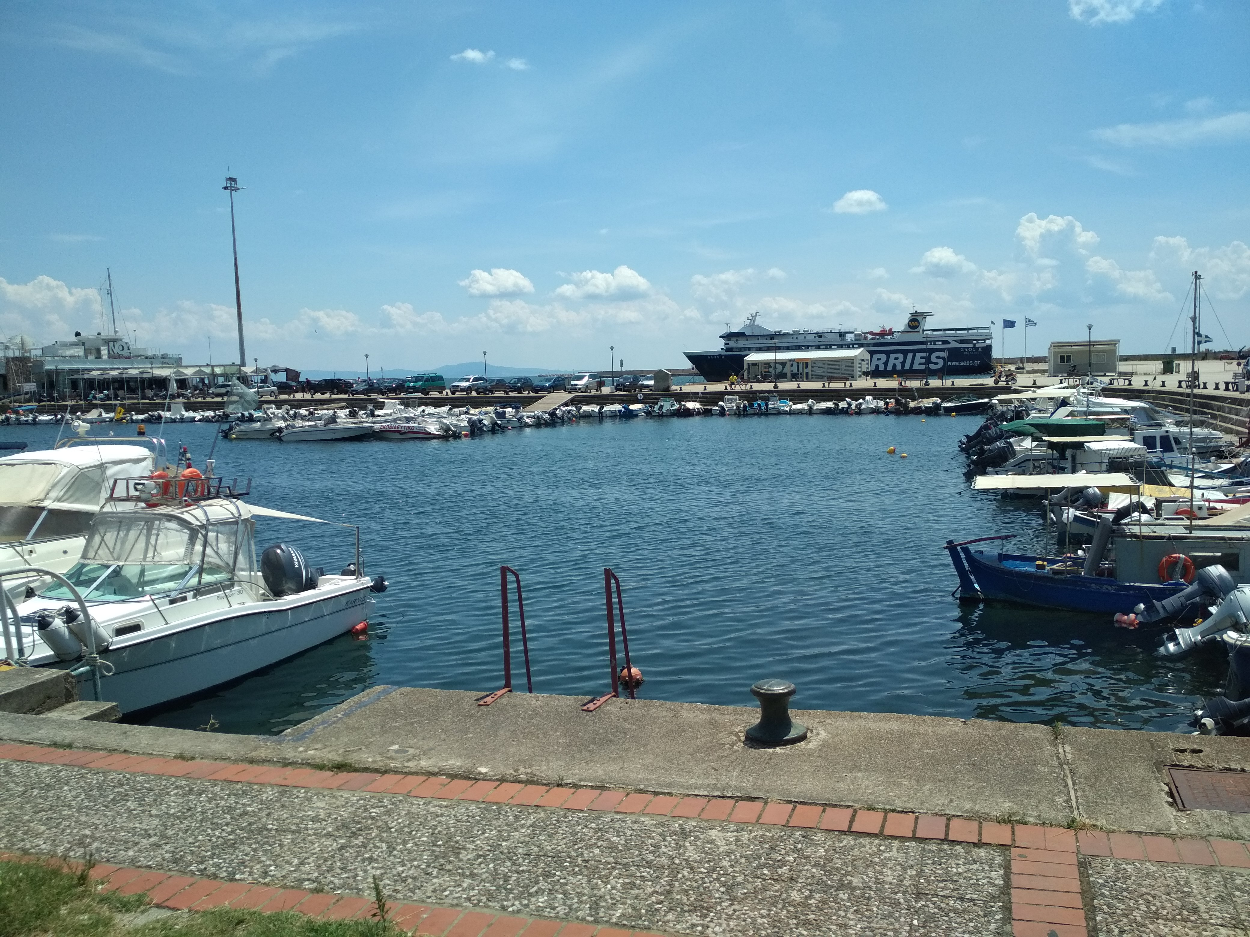 Άποψη του λιμανιού της Αλεξανδρούπολης